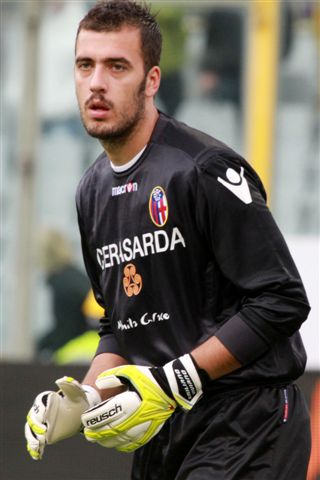 Il portiere di calcio italiano Emiliano Viviano al Bologna.